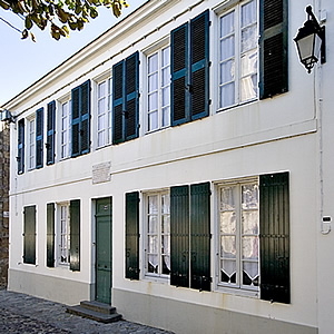 Maison natale d'Ernest Cognacq à Saint-Martin-de-Ré- Île de Ré Photo issue de ma banque d'images personnelle : Pep.per 14 mars 2006 à 00:06 (CET)